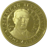 Üzeyir Hacıbəyovun xatirəsinə həsr olunmuş qızıl sikkə